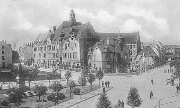 Höhere Mädchenschule mit Bismarckplatz in Essen um 1907